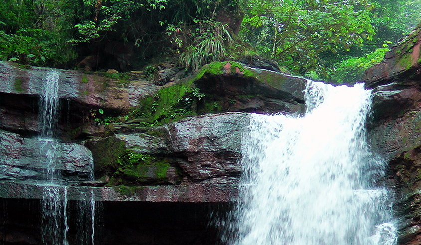 INICIO DE GUACAMAYO